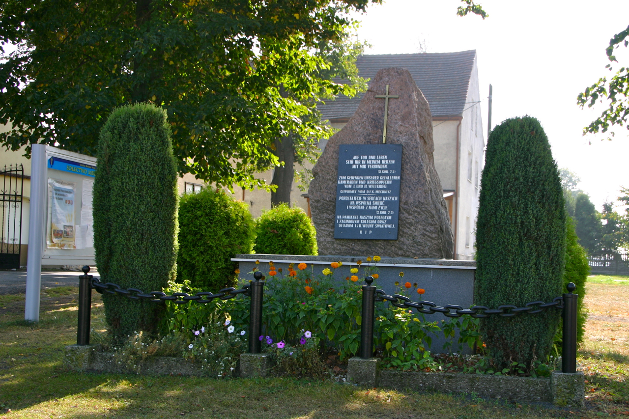 Mechnica (dodatkowa nazwa w j. niem. Mechnitz) – wieś w Polsce położona w województwie opolskim, w powiecie kędzierzyńsko-kozielskim, w gminie Reńska Wieś.